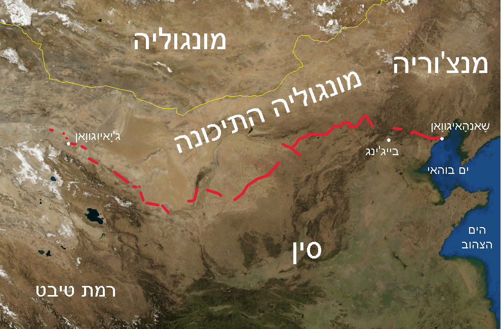 חומת שושלת מינג